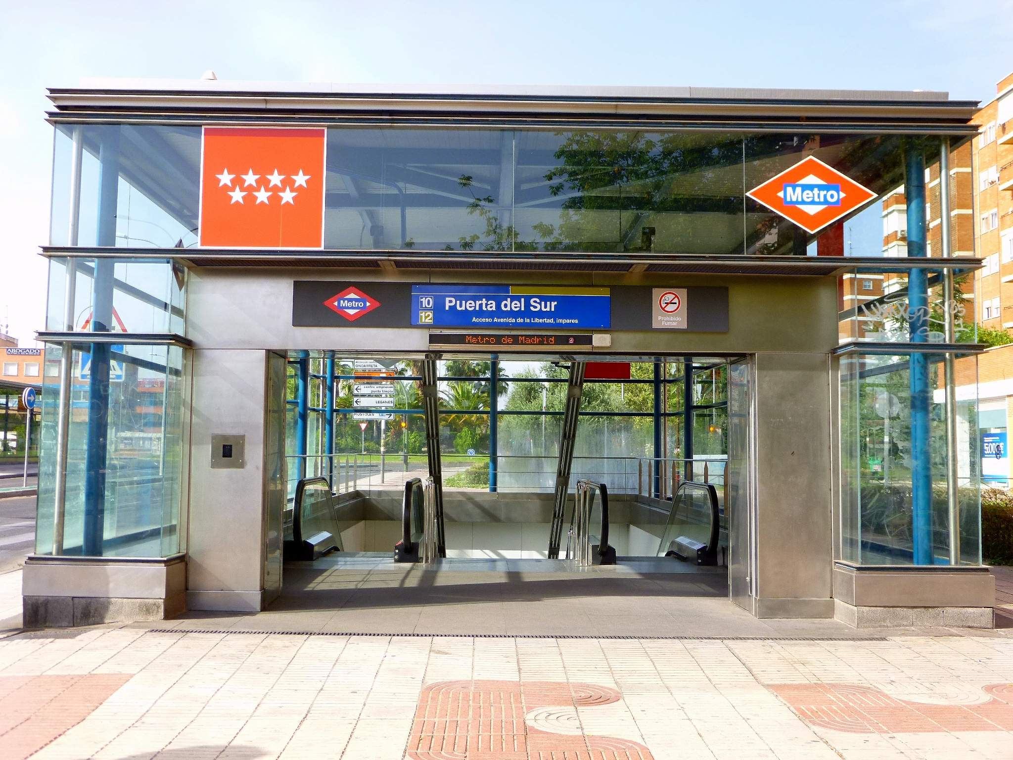 Estación de Puerta del Sur, del Metro de Madrid, en Alcorcón